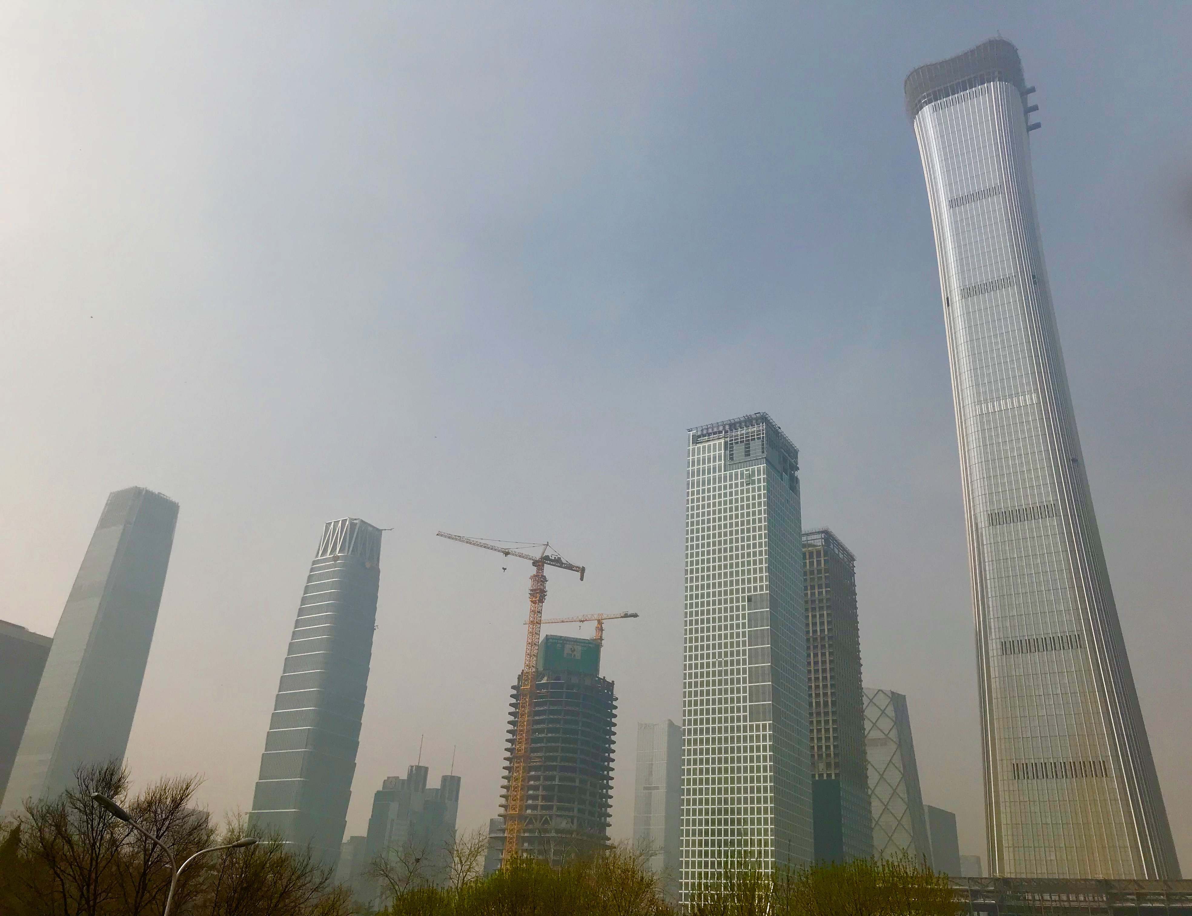 Pekings centrala finansdistrikt (april 2018)